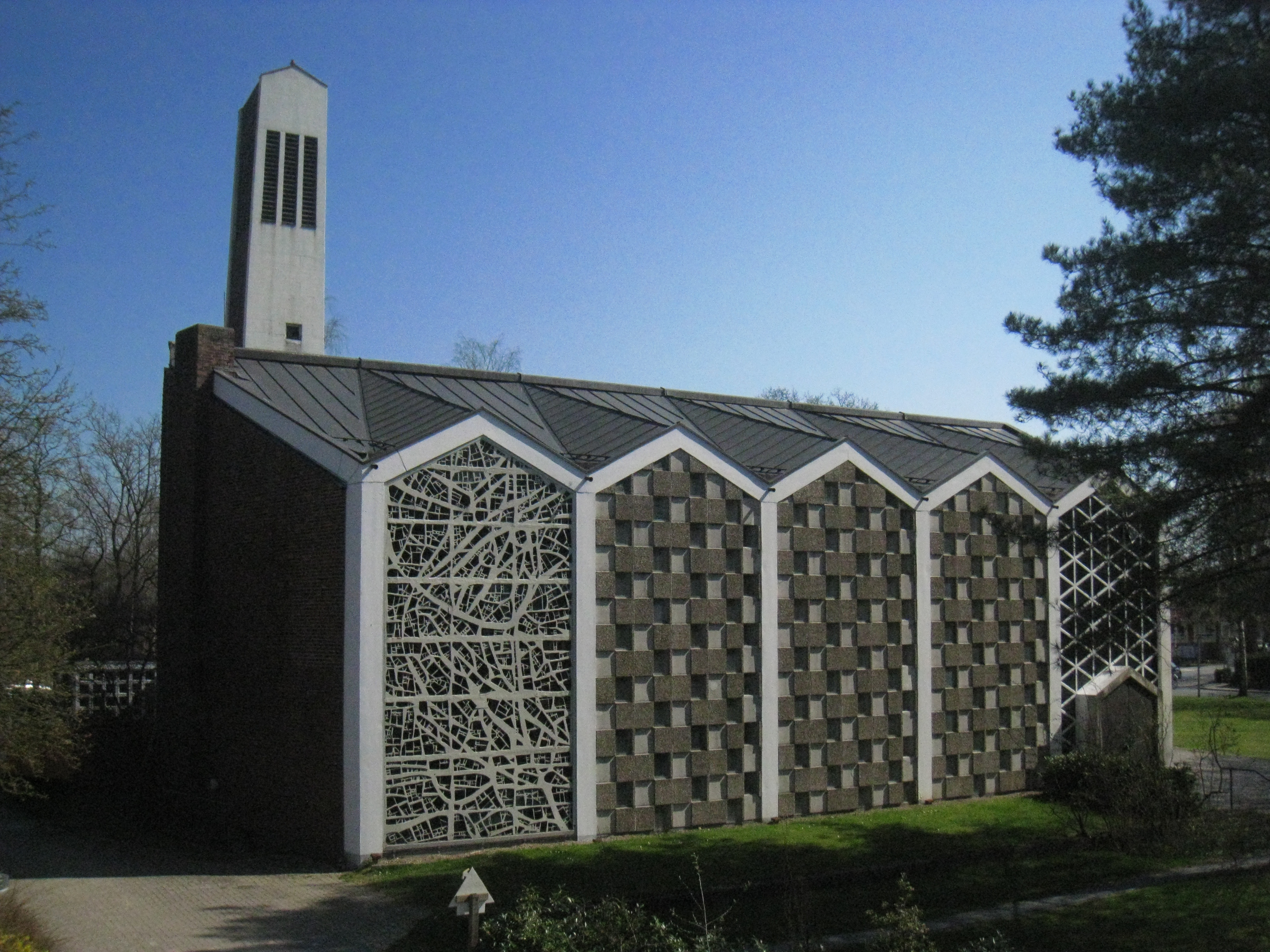 Thomaskirche (Oldenburg) von Westen